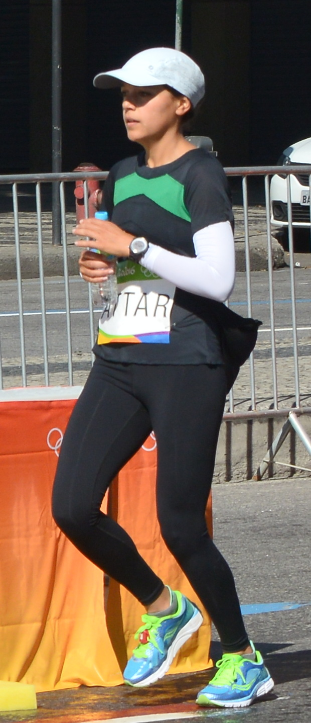 Passage du marathon des jeux olympiques de Rio 2016 dans le centre de Rio